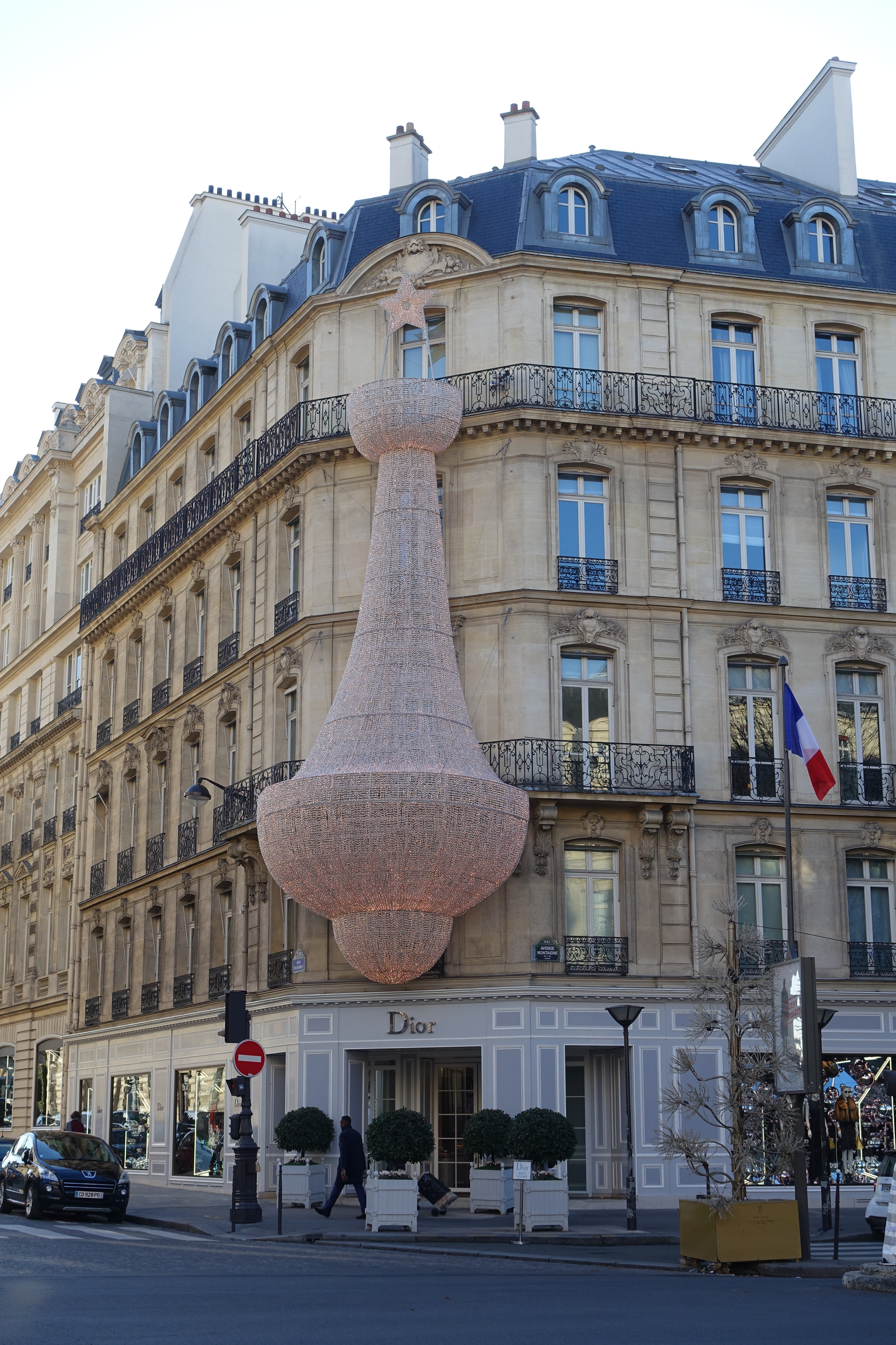 Christmas decoration @ Dior store @ Avenue Montaigne @ Paris